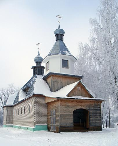 Церковь Николая Чудотворца в Глинке